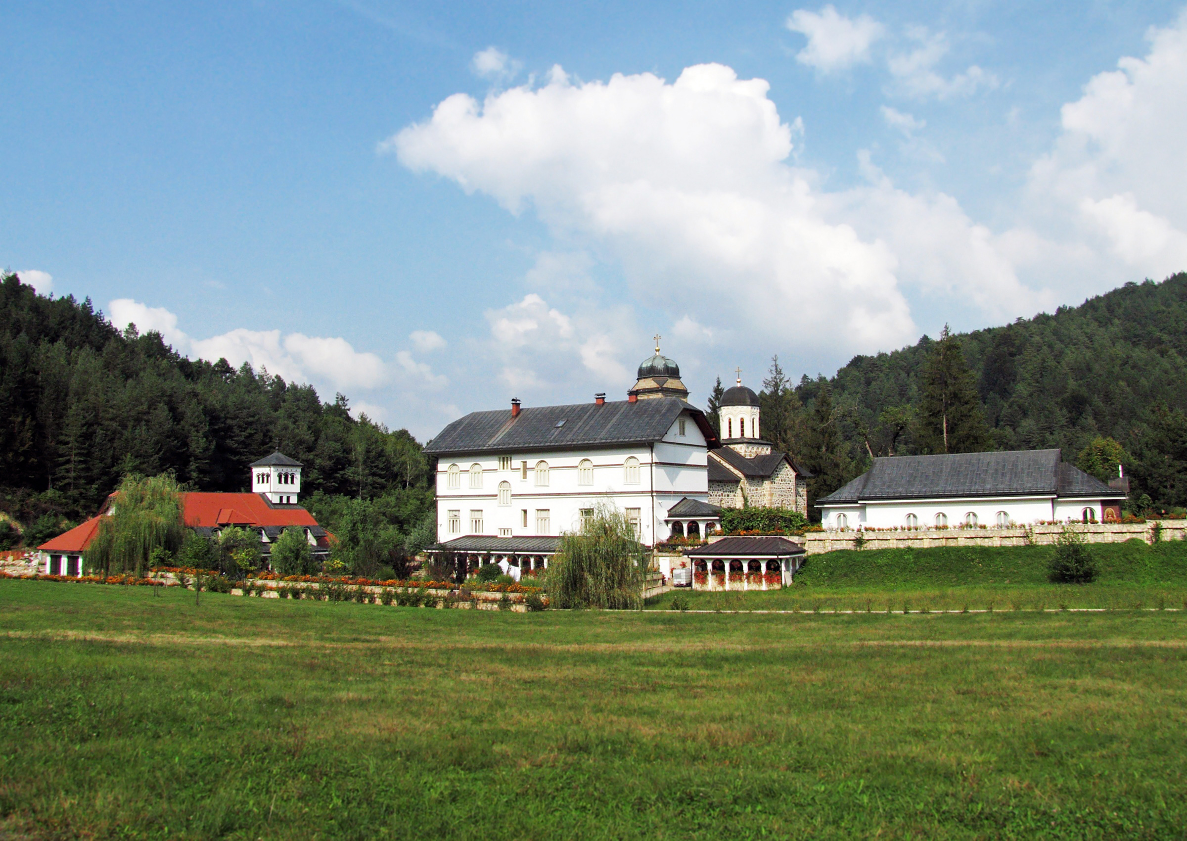 Манастир Светог Оца Николе на Озрену